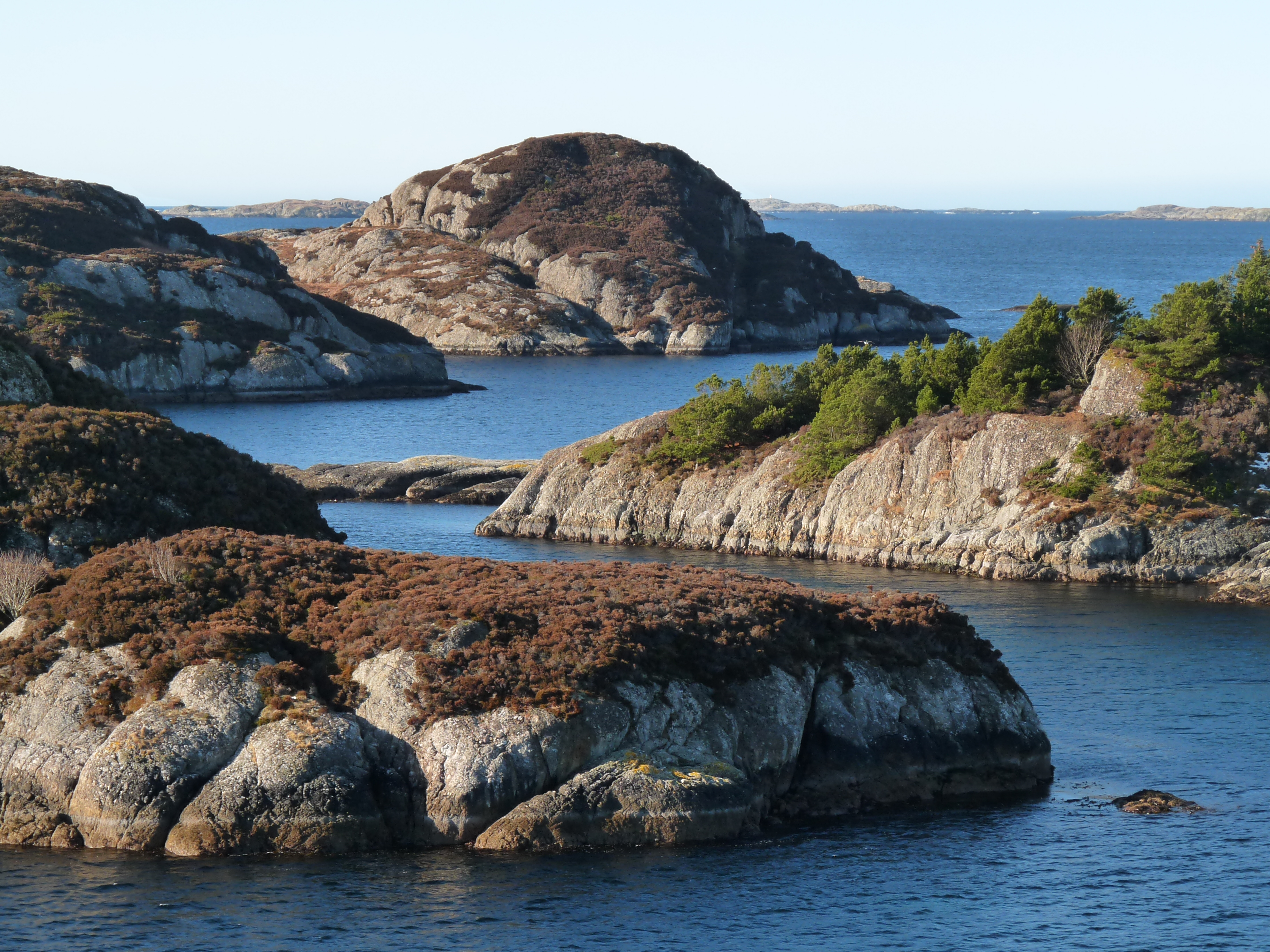 07 Ospa Narrows